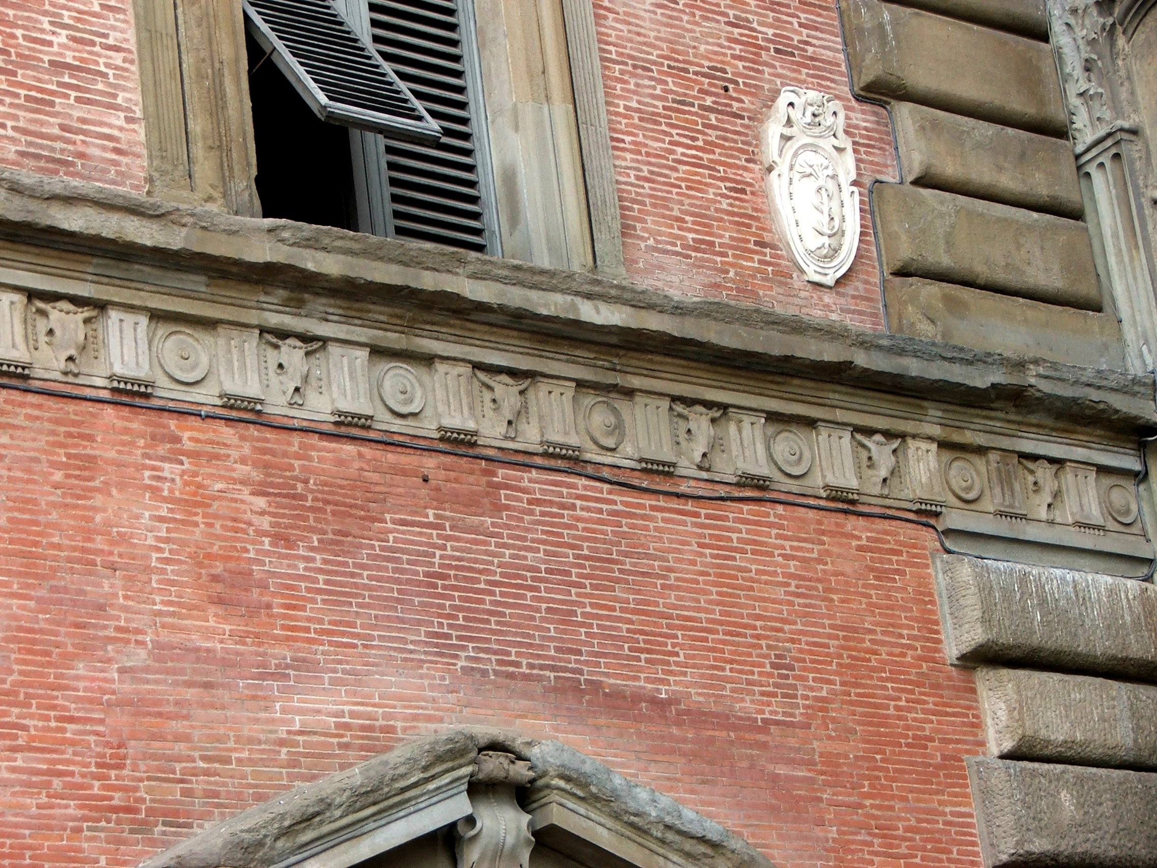 facciata di Palazzo Budini Gattai, visto da Piazza Santissima Annunziata, particolare del fregio tra piano terra e primo piano